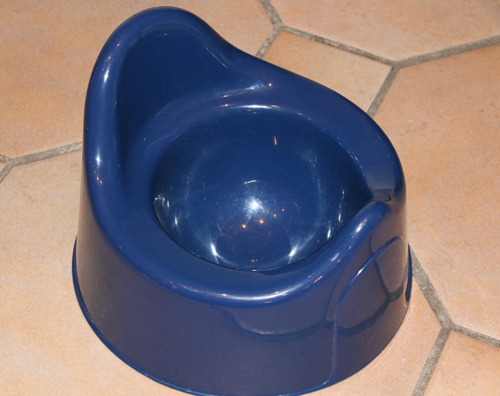 Kindertopf